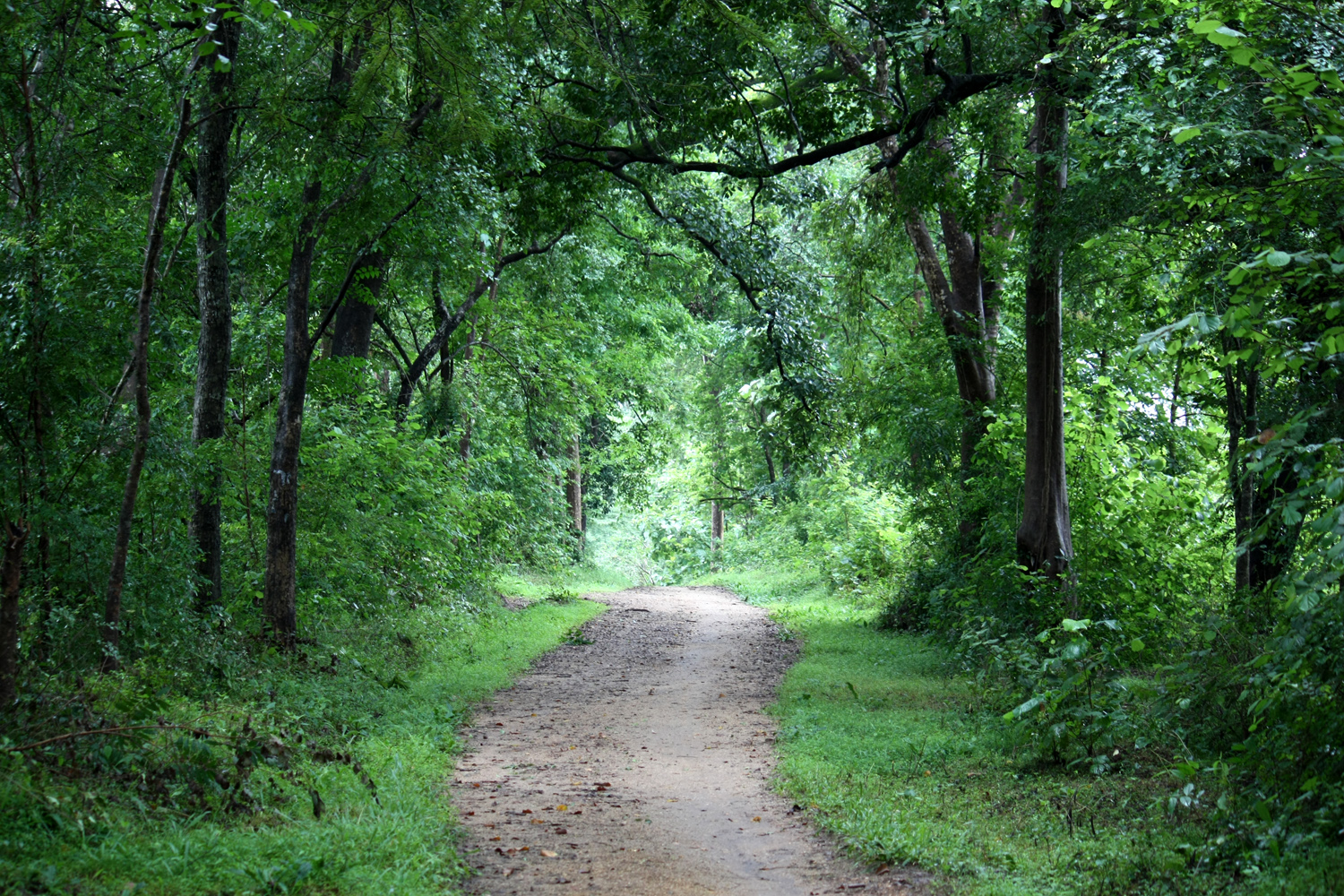 முறையாக செய்யப்படாமல் தொடர்ச்சியாக மக்கள் நடமாட்டத்தினால் உருவாகிய வீதியொன்று அம்பாறை (இலங்கை) கிராமத்தில்